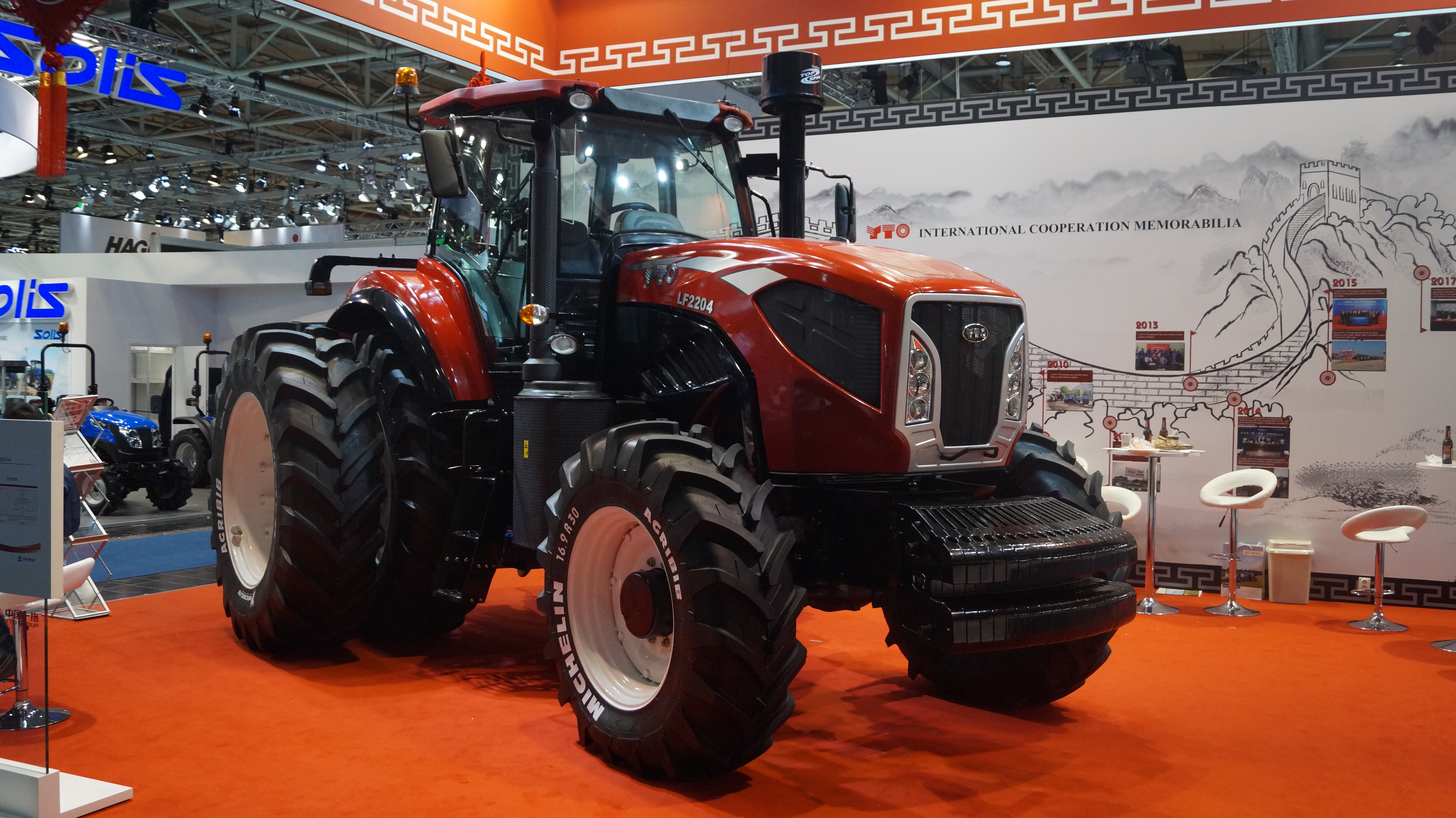 Schrägansicht der Front eines YTO LF2204, ausgestellt auf der Agritechnica 2017.